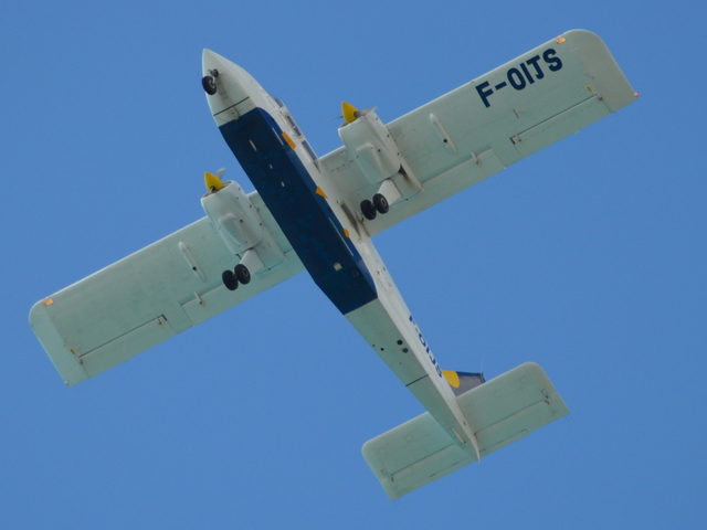 At St Marteen (SXM/TNCM)